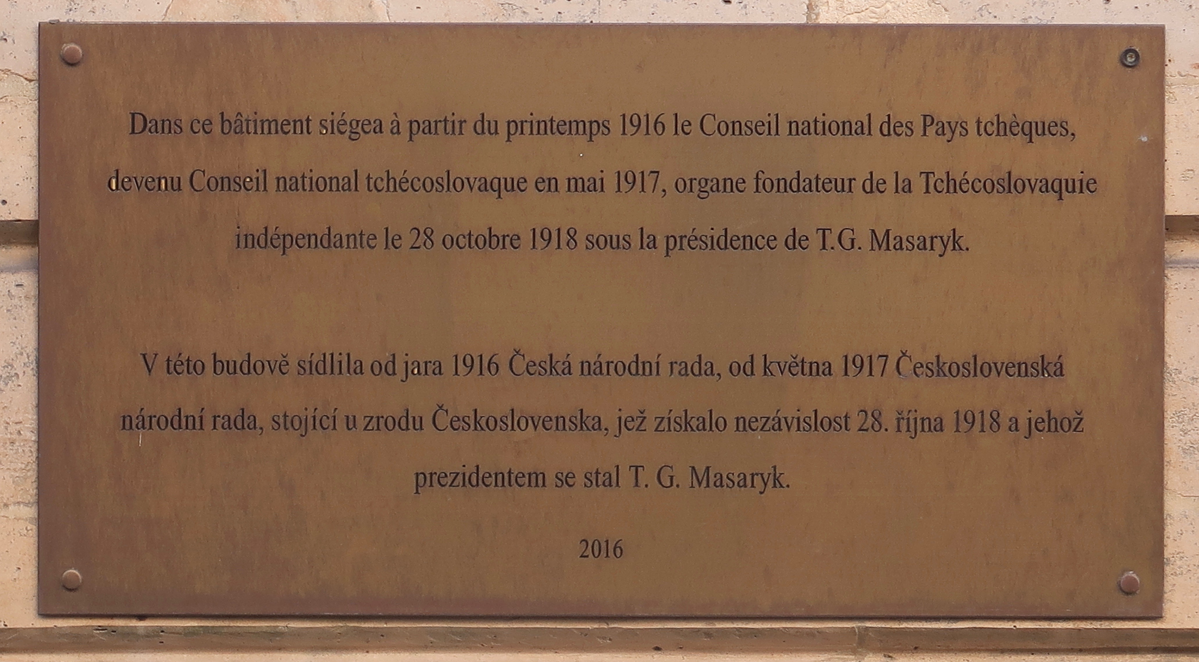 Plaque commémorative sur la maison 18 rue Bonaparte à Paris, 6. Arrondissement, où fut formé le gouvernement tchécoslovaque en 1916. Abrite actuellement les services consulaires et le centre culturel tchèque. Plaque posée en 2016.